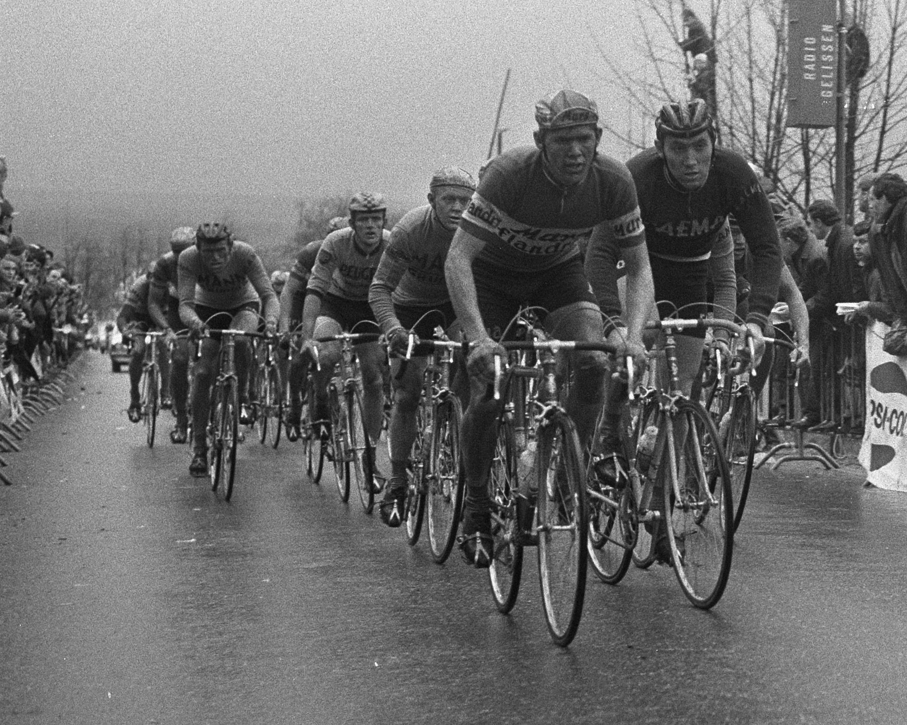 Wereldkampioenschappen veldrijden op de fiets, Apeldoorn; nr. 9, 11: E. de Vlaeminck in aktie; nr. 10, 12: C. Zoontjes in aktie.